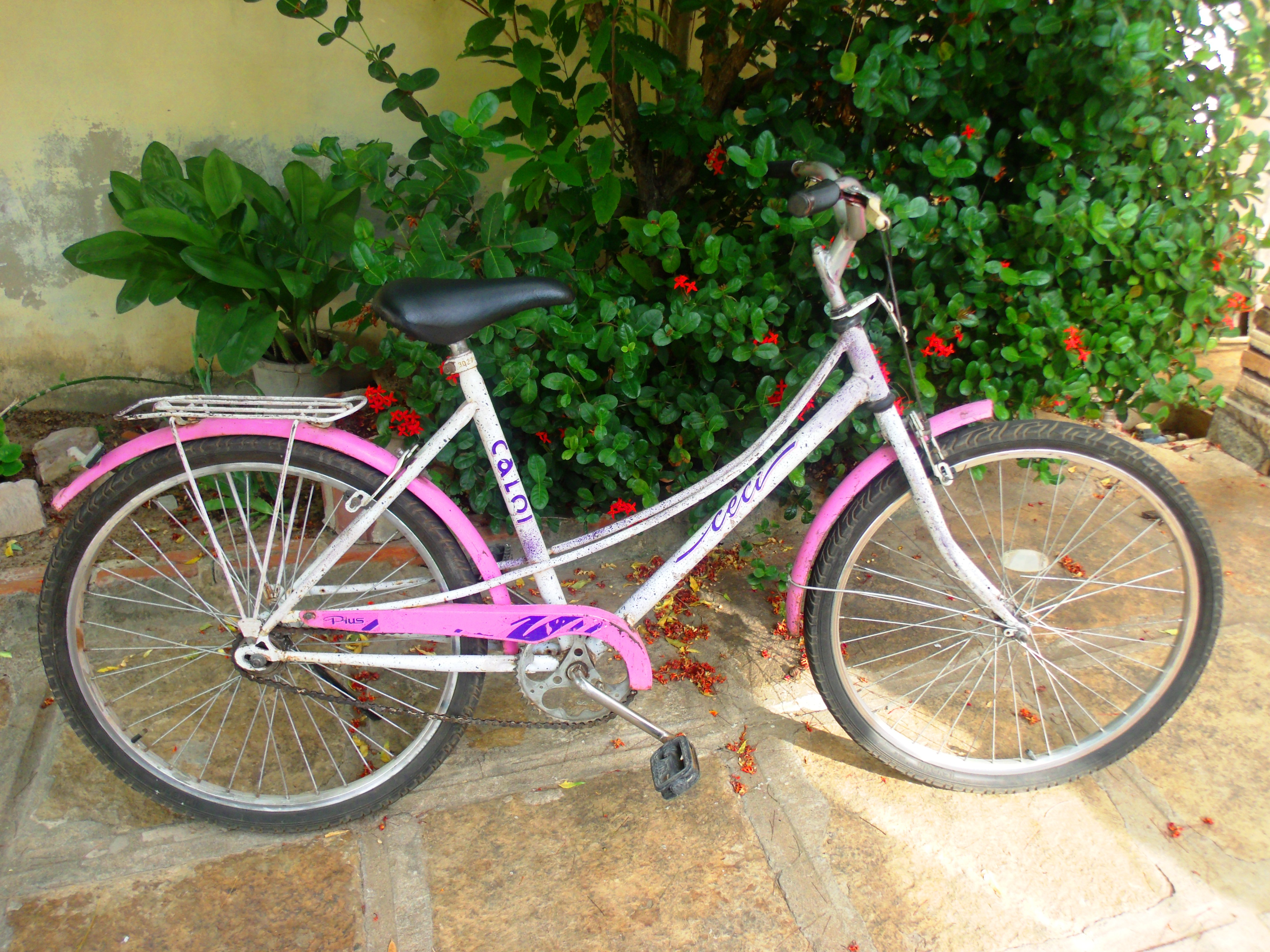 Uma Caloi Ceci dos anos 1990 ainda com as cores originais.